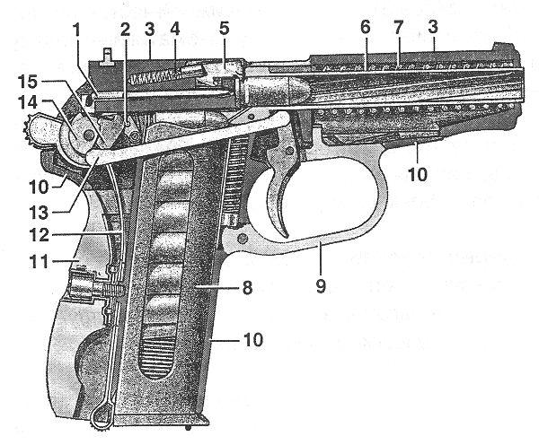 пистолет ПМ